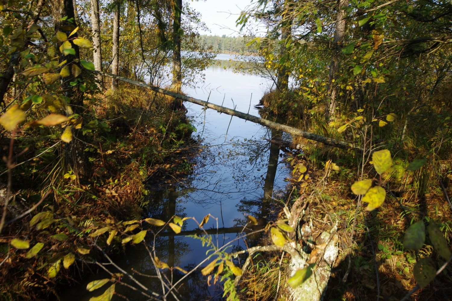 Pulimo ežeras Alionių pelkės masyve